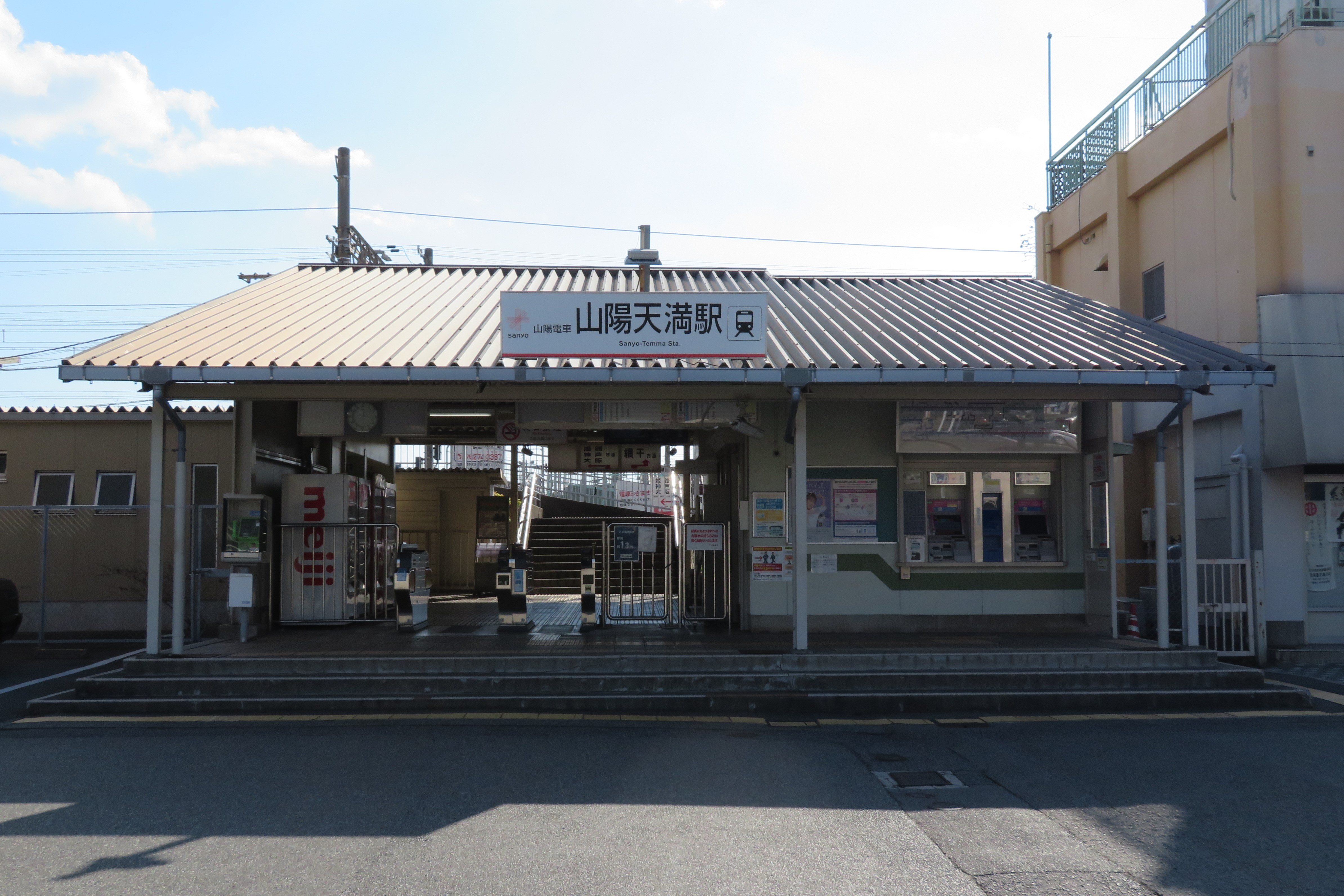 山陽天満駅